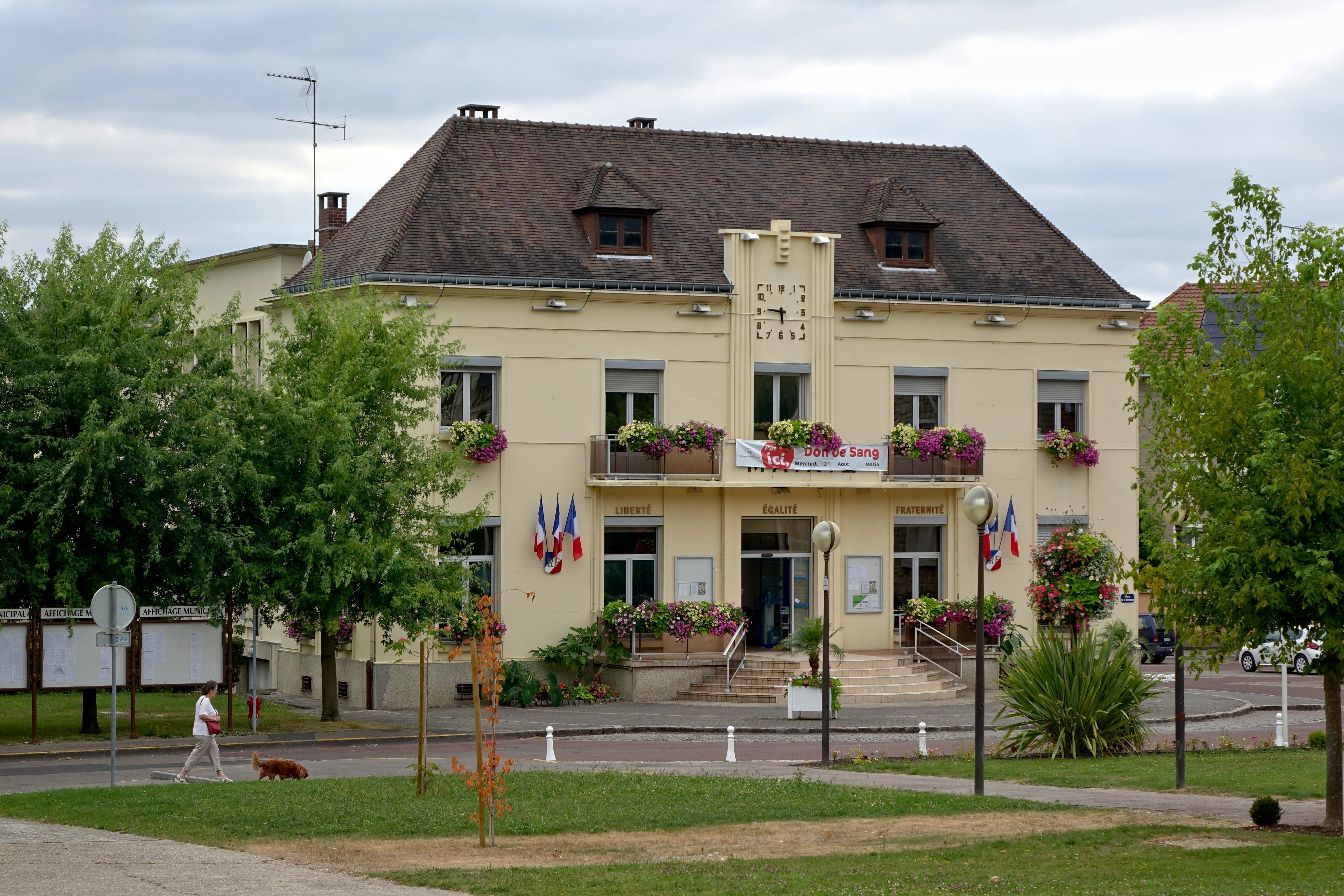 Mairie du Trait, Seine-Maritime, France